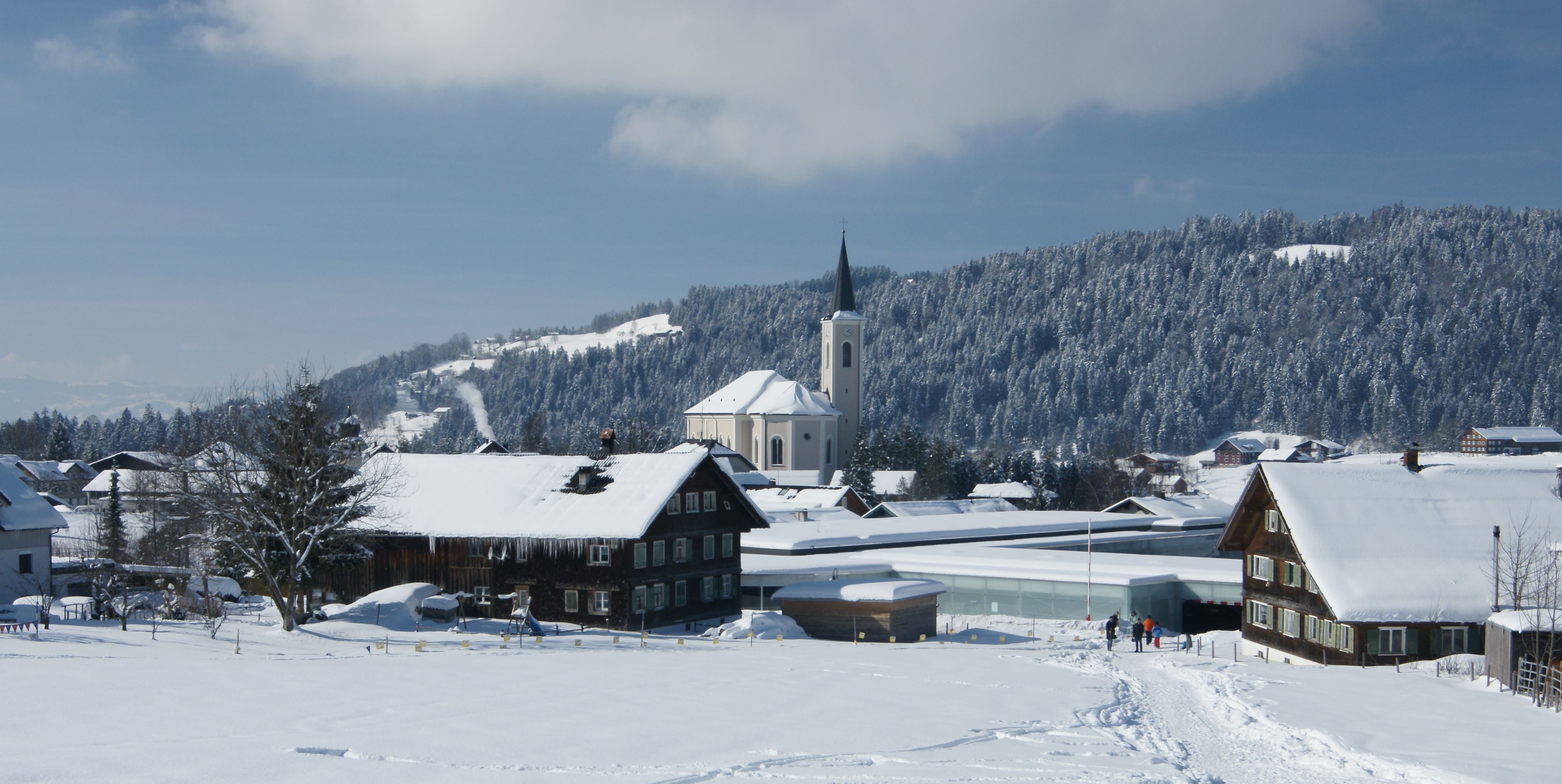 Blick von der Talstation Brüggelekopf auf die Pfarrkirche hl. Martin von Alberschwende.